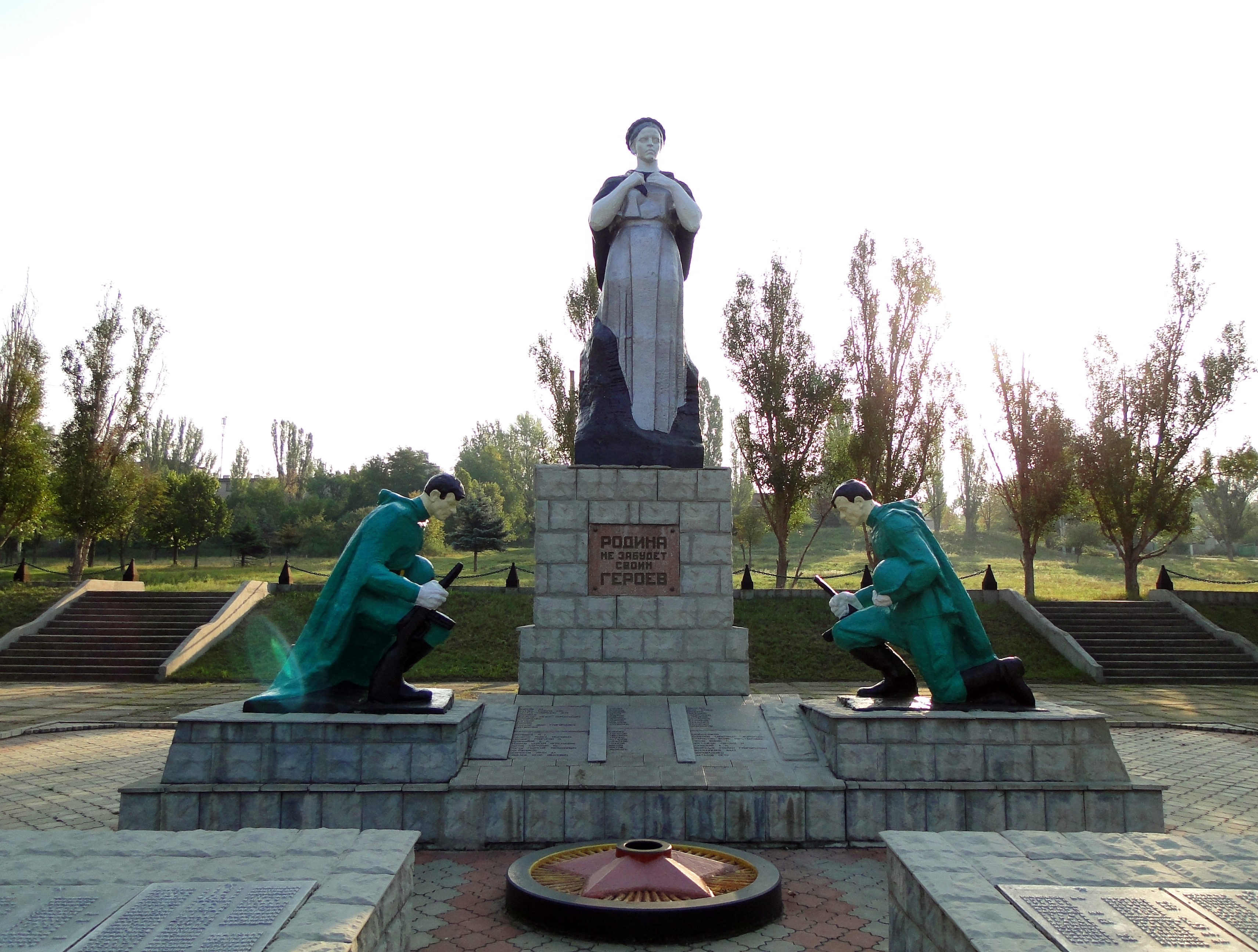 Братська могила радянських воїнів Південно-Західного фронту і пам'ятник воїнам-землякам